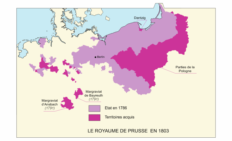 La Prusse en 1803